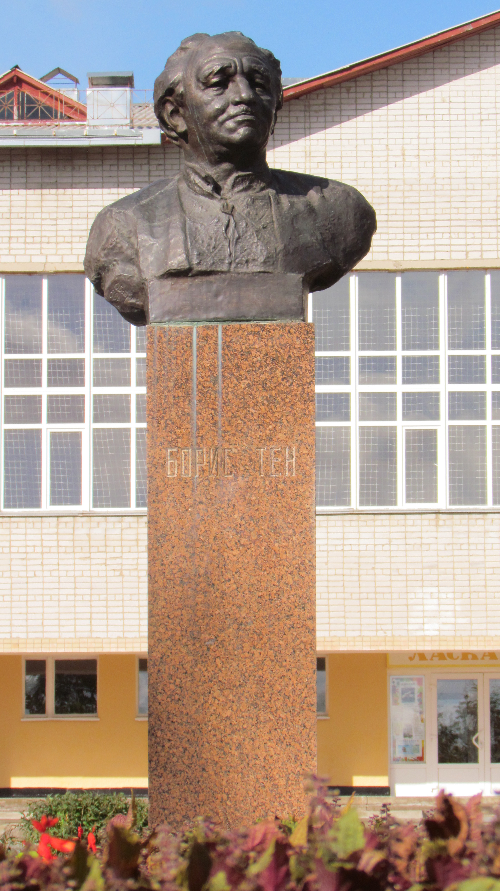 Пам'ятник Борису Тену (М. В. Хомичевському) — українському поету й перекладачу., Житомир, Вул. Шевченка, 105Біля ЗОШ № 24